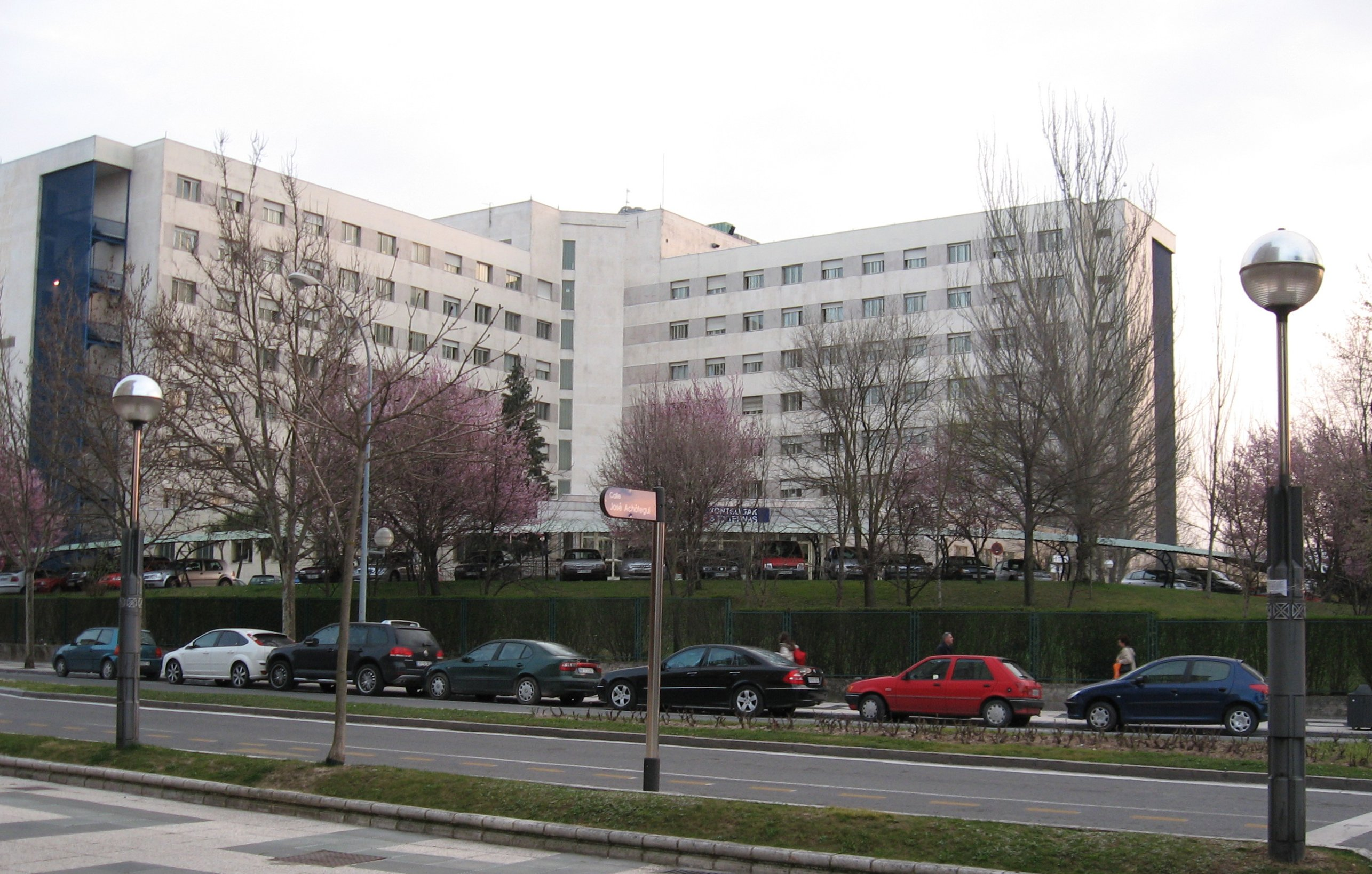 Hospital de Txagorritxu